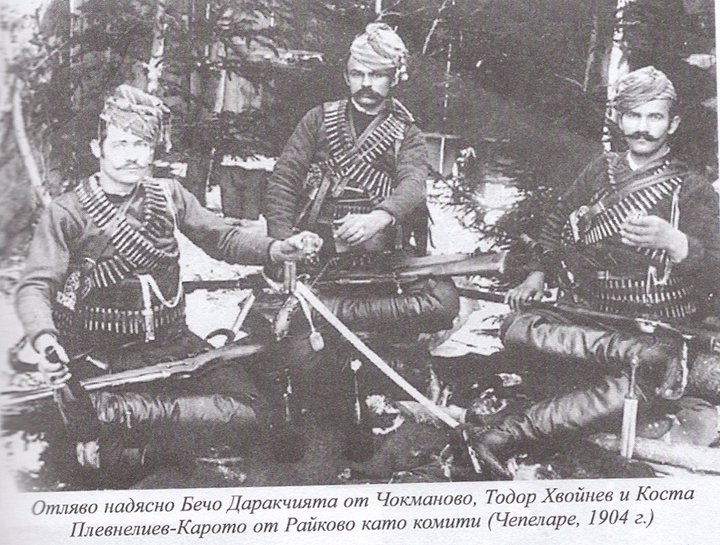 Петър Даракчиев, Тодор Хвойнев, Коста Плевнелиев.